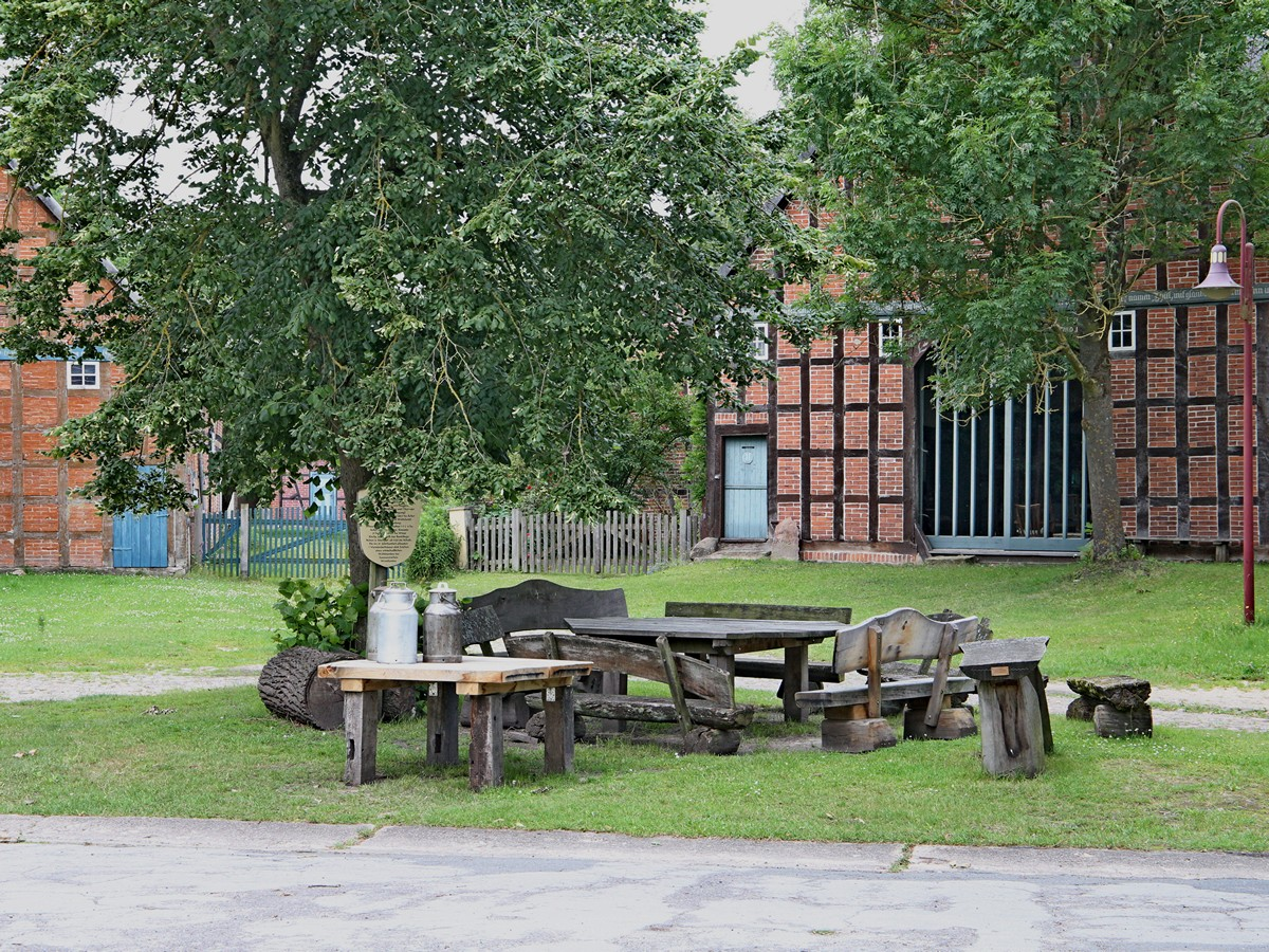 Auf alt gemachter Anger in Bussau.